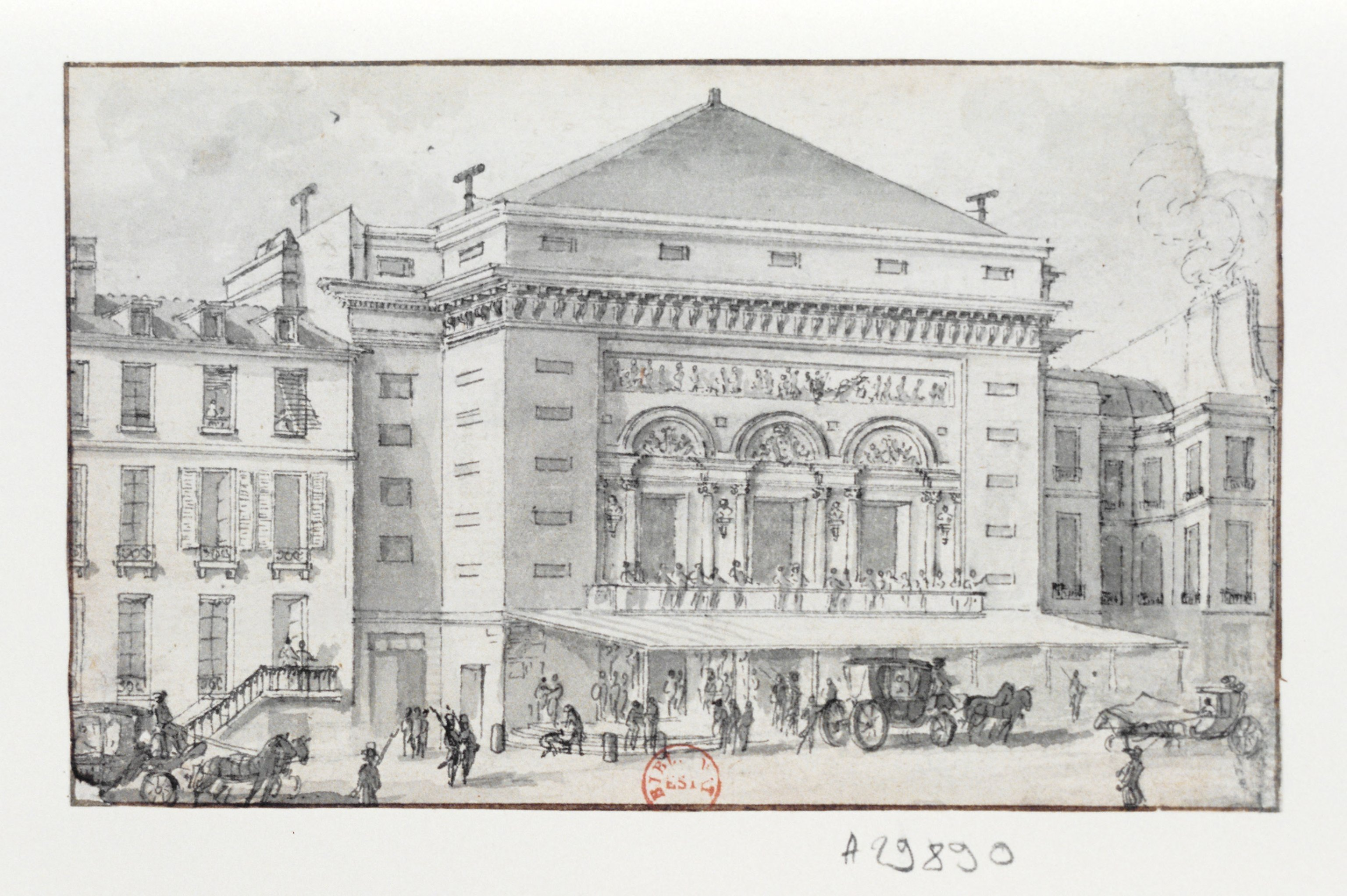 Théâtre de la Porte-Saint-Martin, Dessin à la plume et lavis à l'encre de Chine ; 9,4 x 13,7 cm